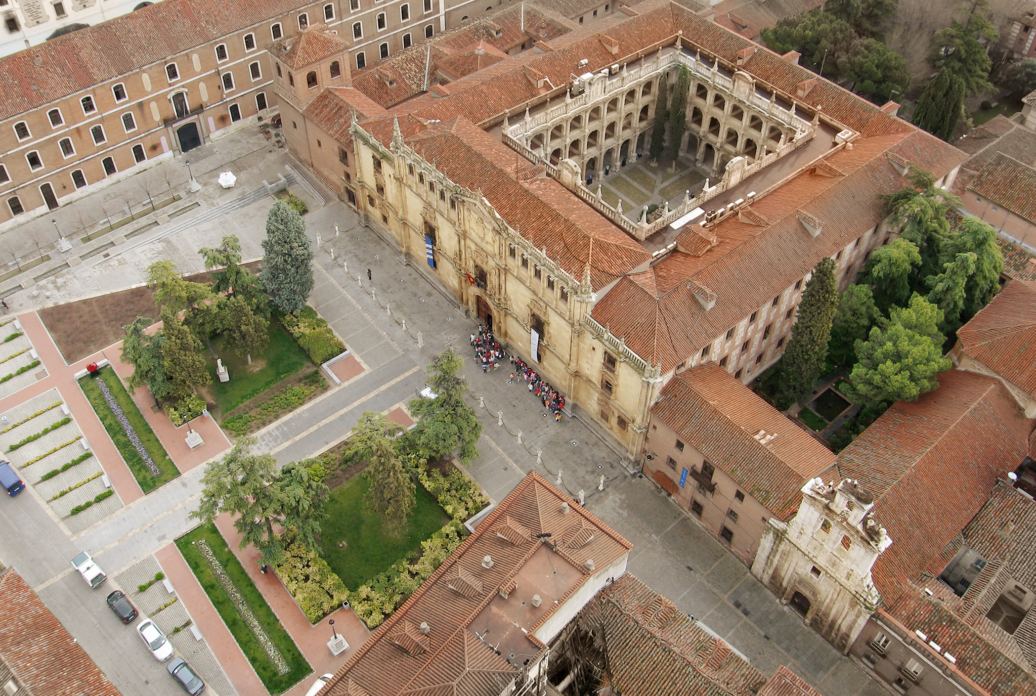 Colegio de San Ildefonso (RI-51-0000132) Universidad de Alcalá 40°28′58″N 3°21′47″W